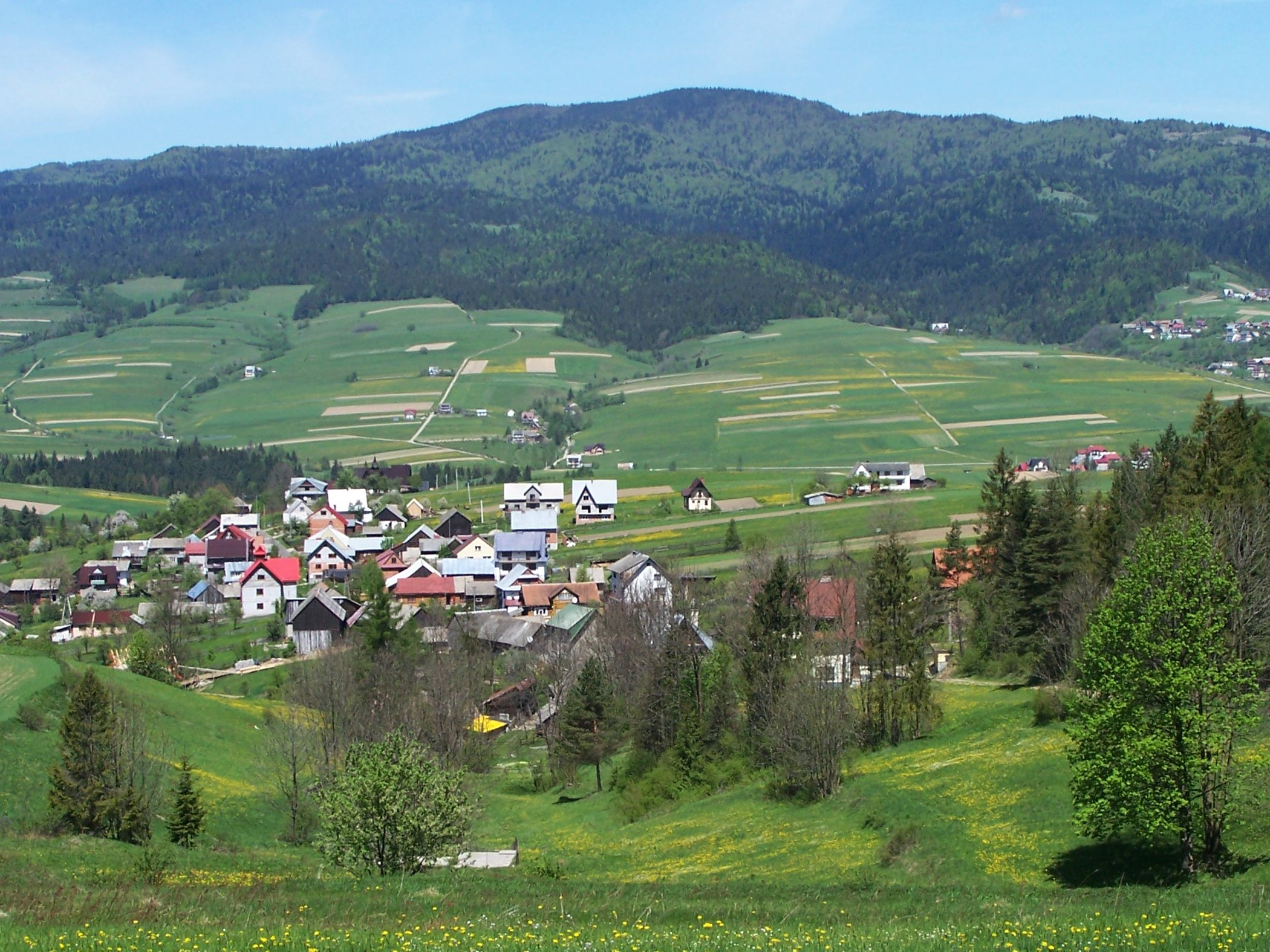 Lubań (Gorce), Hałuszowa